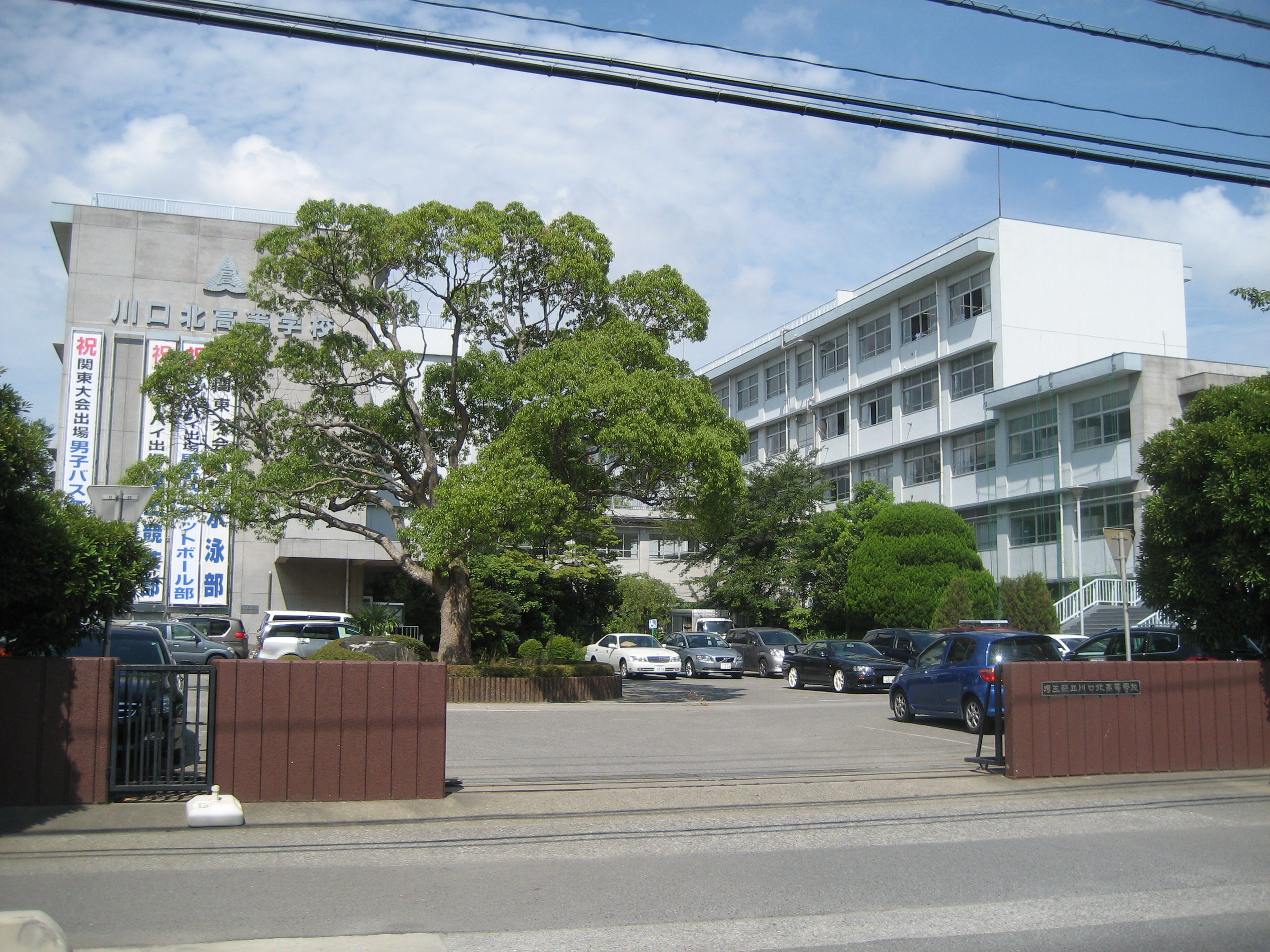 埼玉県立川口北高等学校校舎（正門付近から撮影）